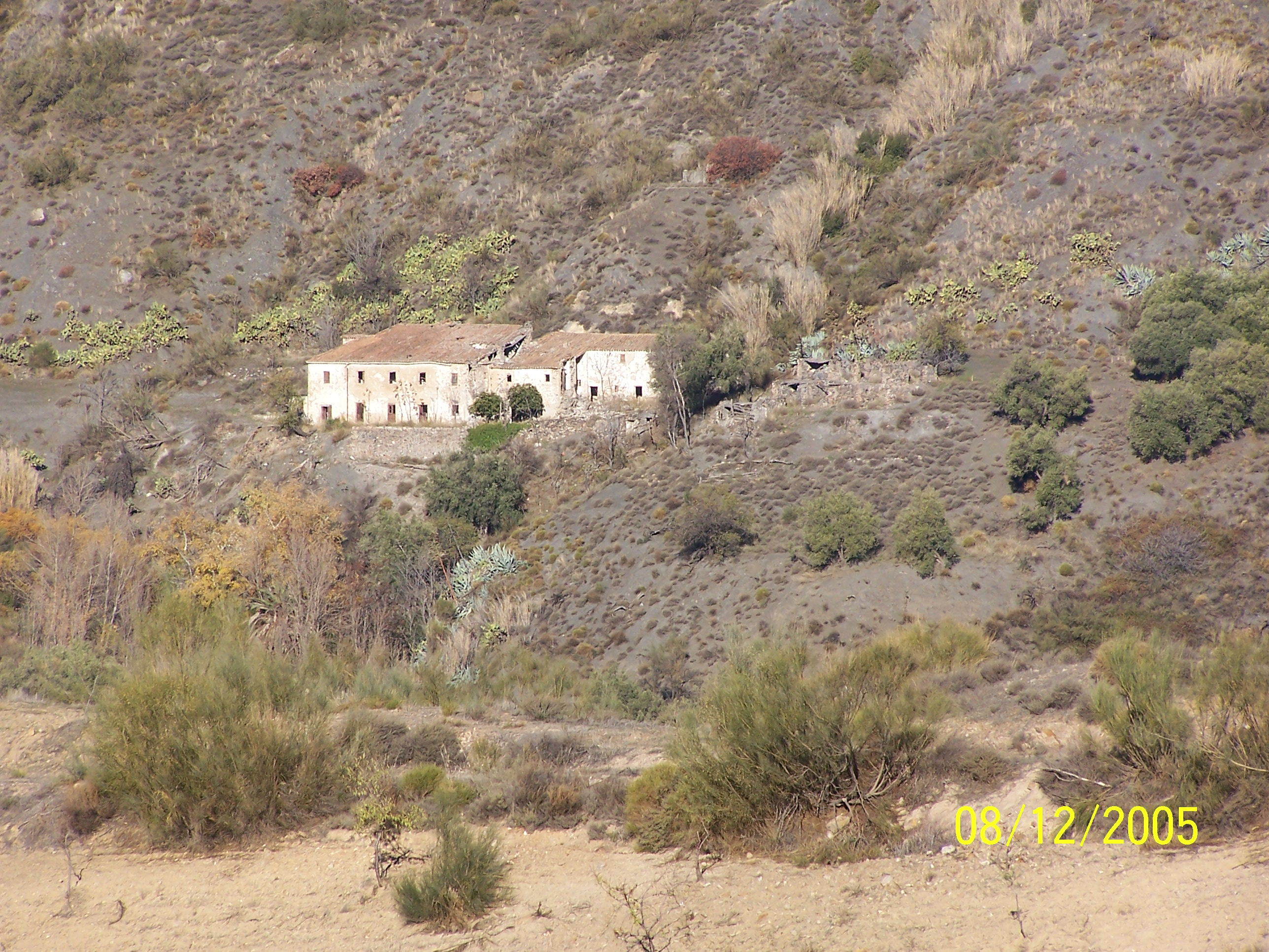 Vista de los Baños del piojo antes de su rehabilitación para Centro Termal